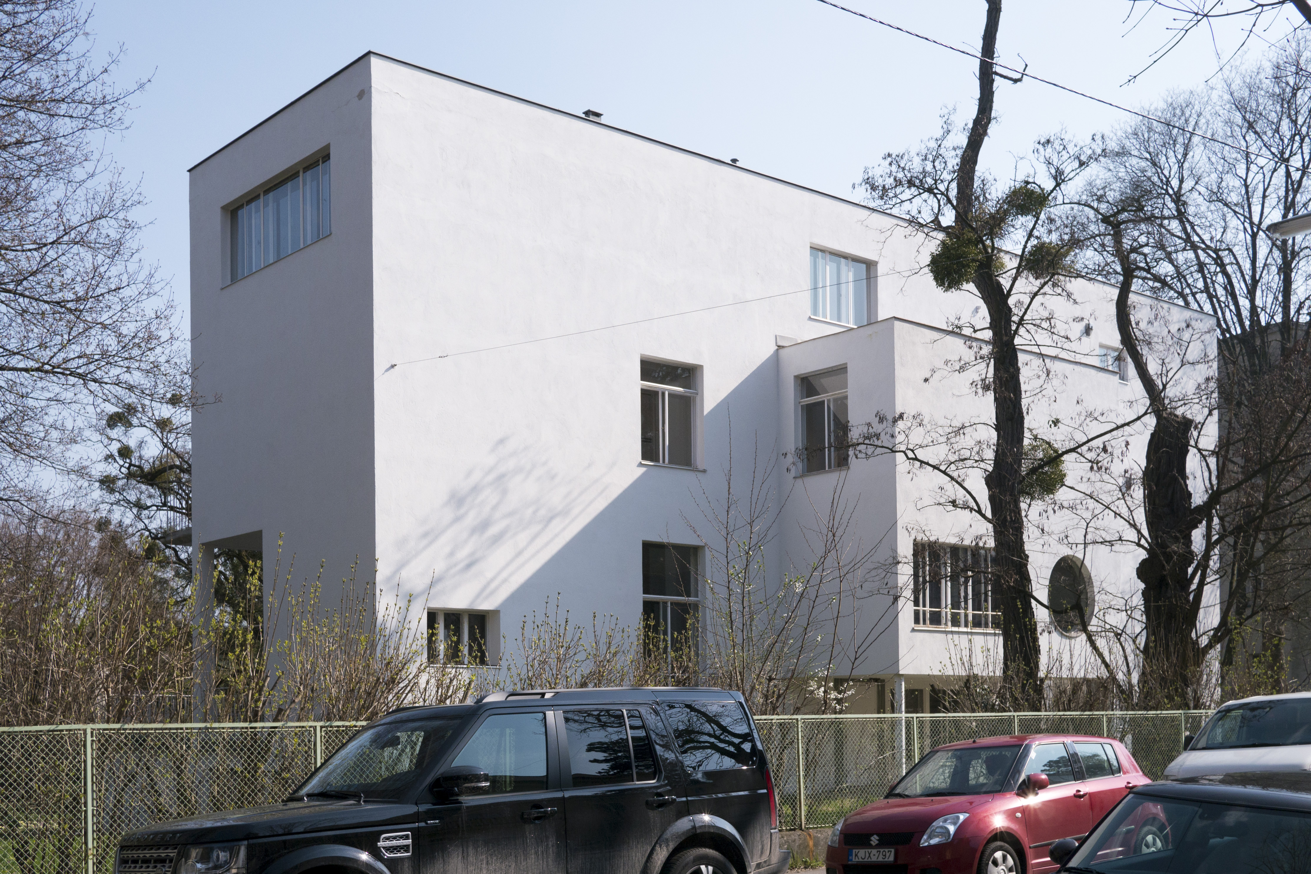 Villa / Landhaus, Haus Beer